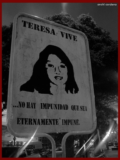 "Teresa Vive". Homenaje a Teresa Rodríguez. Cutral Có. Neuquén. Argentina. Teresa Rodríguez fue una trabajadora de Cutral Có asesinada por las fuerzas de seguridad durante la pueblada de 1997.